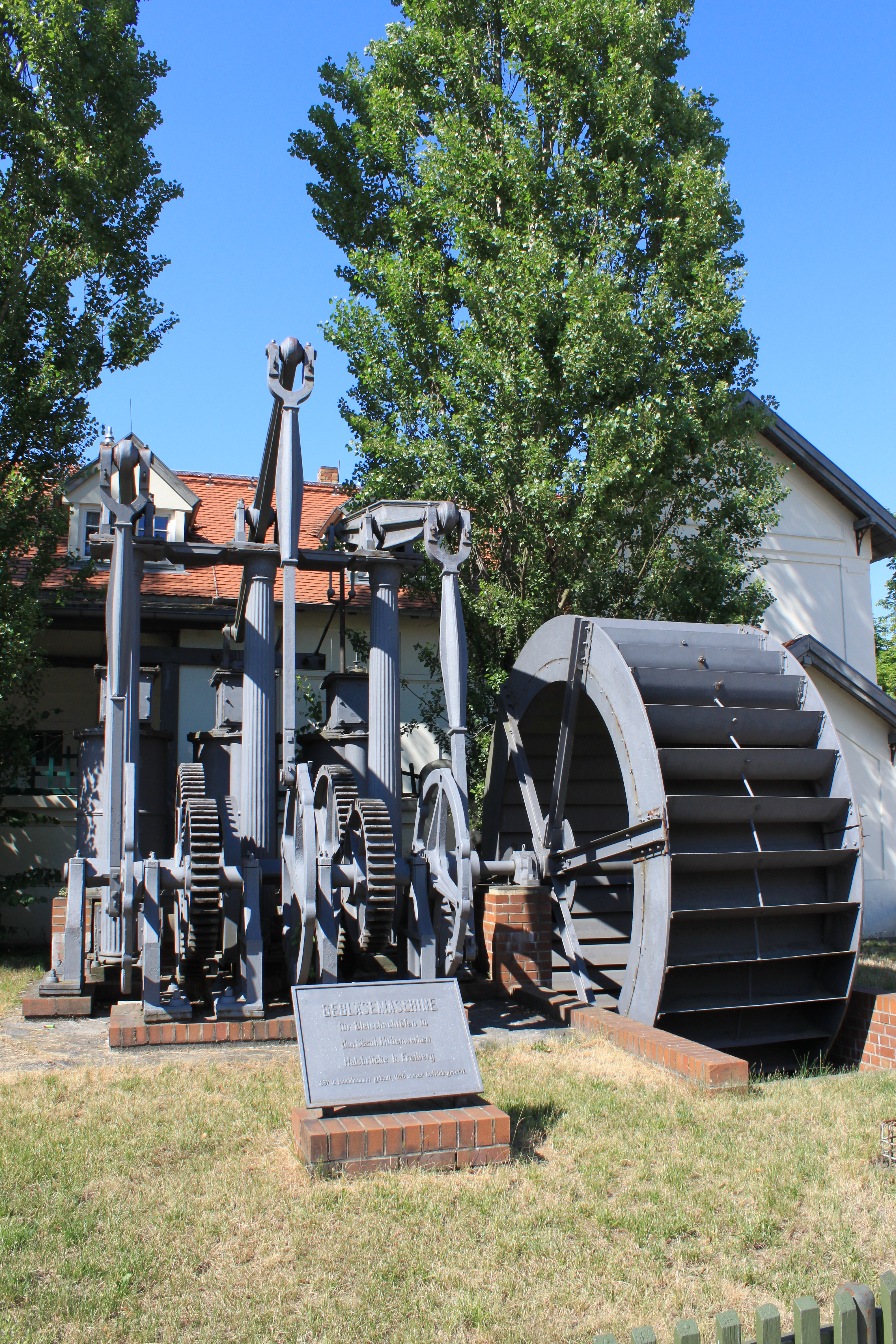 Gebläsemaschine für Bleischachtöfen. 1837 im Lauchhammer gebaut für die Staatlichen Hüttenwerke in Halsbrücke. Gebläse bis 1925 in Betrieb gewesen.